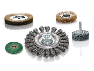 Zum Entrosten, Reinigen, Entgraten oder Bearbeitung von Schweißnähten und Entfernen von Härtezunder und Lack, werden Rundbürsten verwendet. Wenn schmale Werkstücke oder profilierte Oberflächen exakt bearbeitet werden müssen, kommen Einzelscheibenbürsten zum Einsatz. Die Möglichkeit des Aneinanderreihungs von mehreren Einzelscheibenbürsten macht sie extrem vielseitig. Pipelinebürsten bewähren sich hervorragend beim Bau von Öl-, Gas- und Wasserleitungen zum Bearbeiten von Schweißnähten. Sie wurden speziell für die Wurzel- und Kehlnaht entwickelt